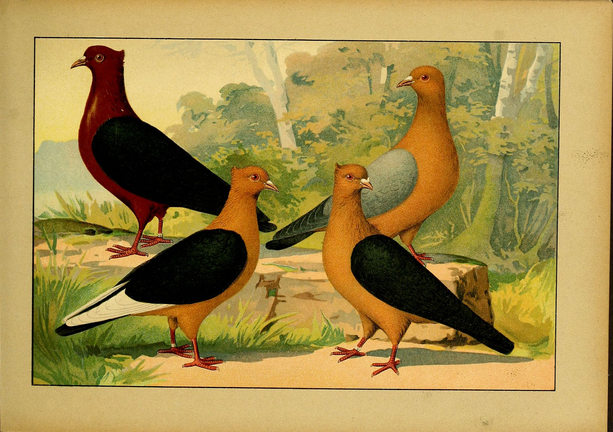 Deutsch